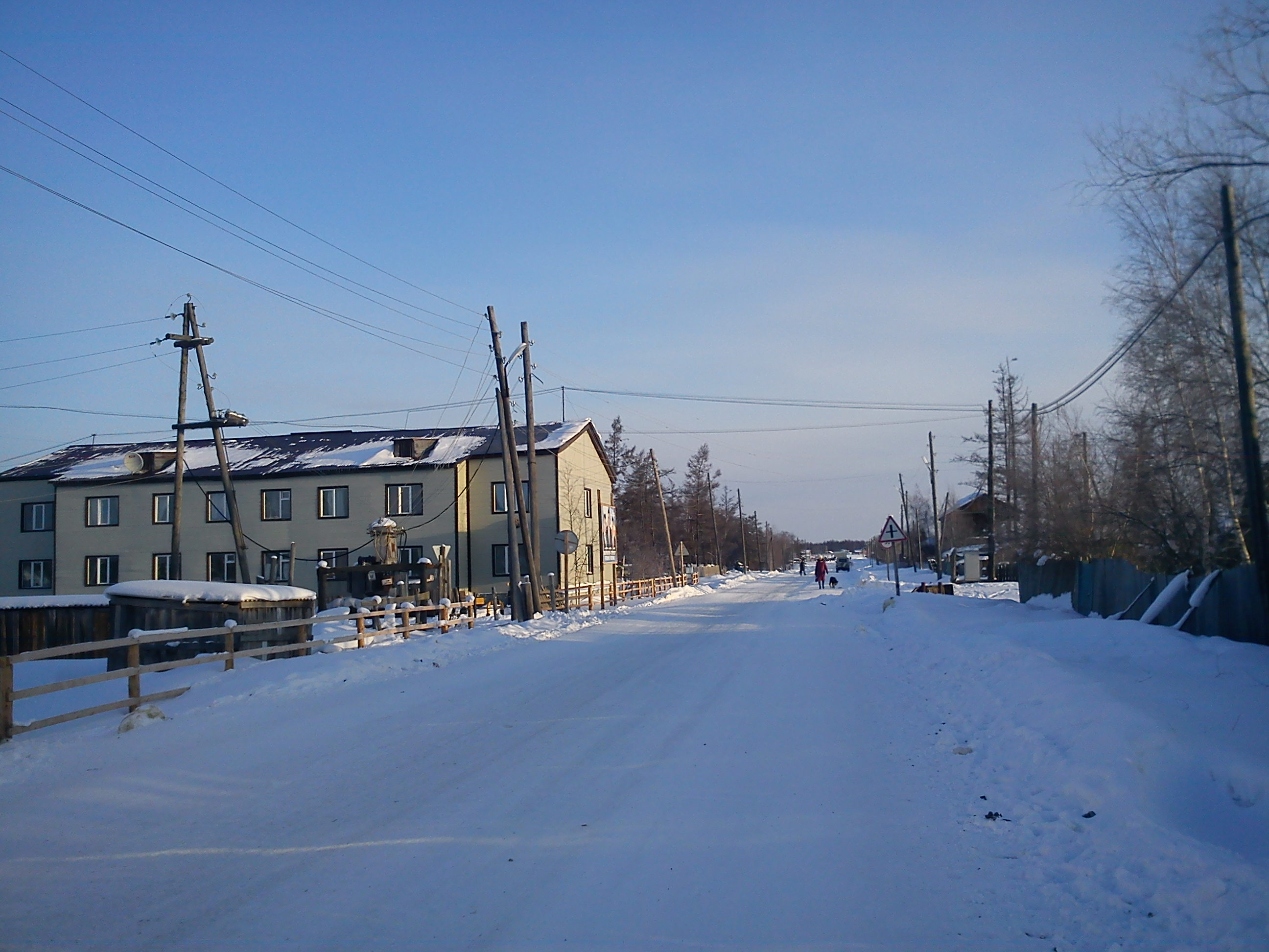 Кобяй